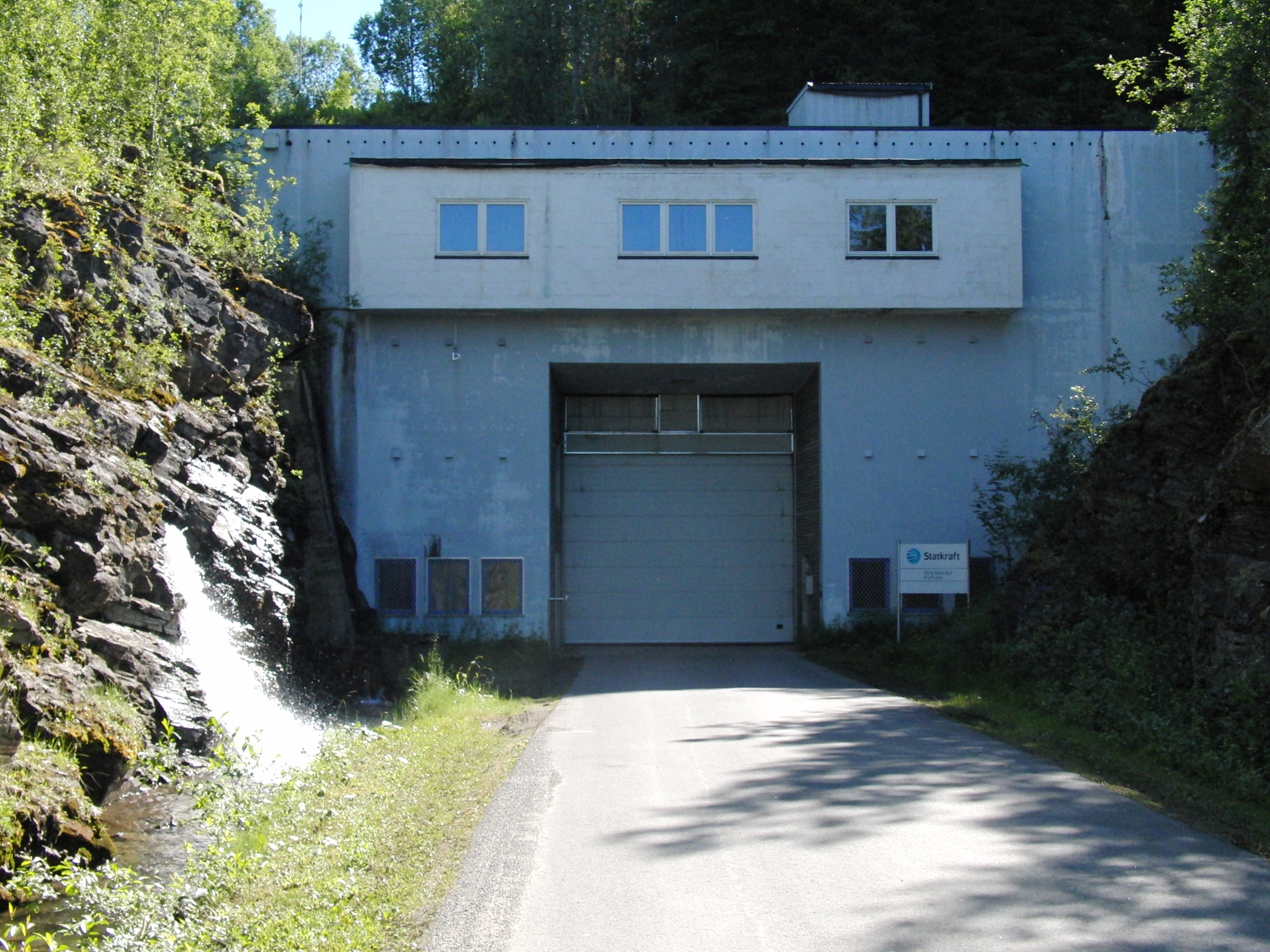 Øvre Røssåga kraftverk